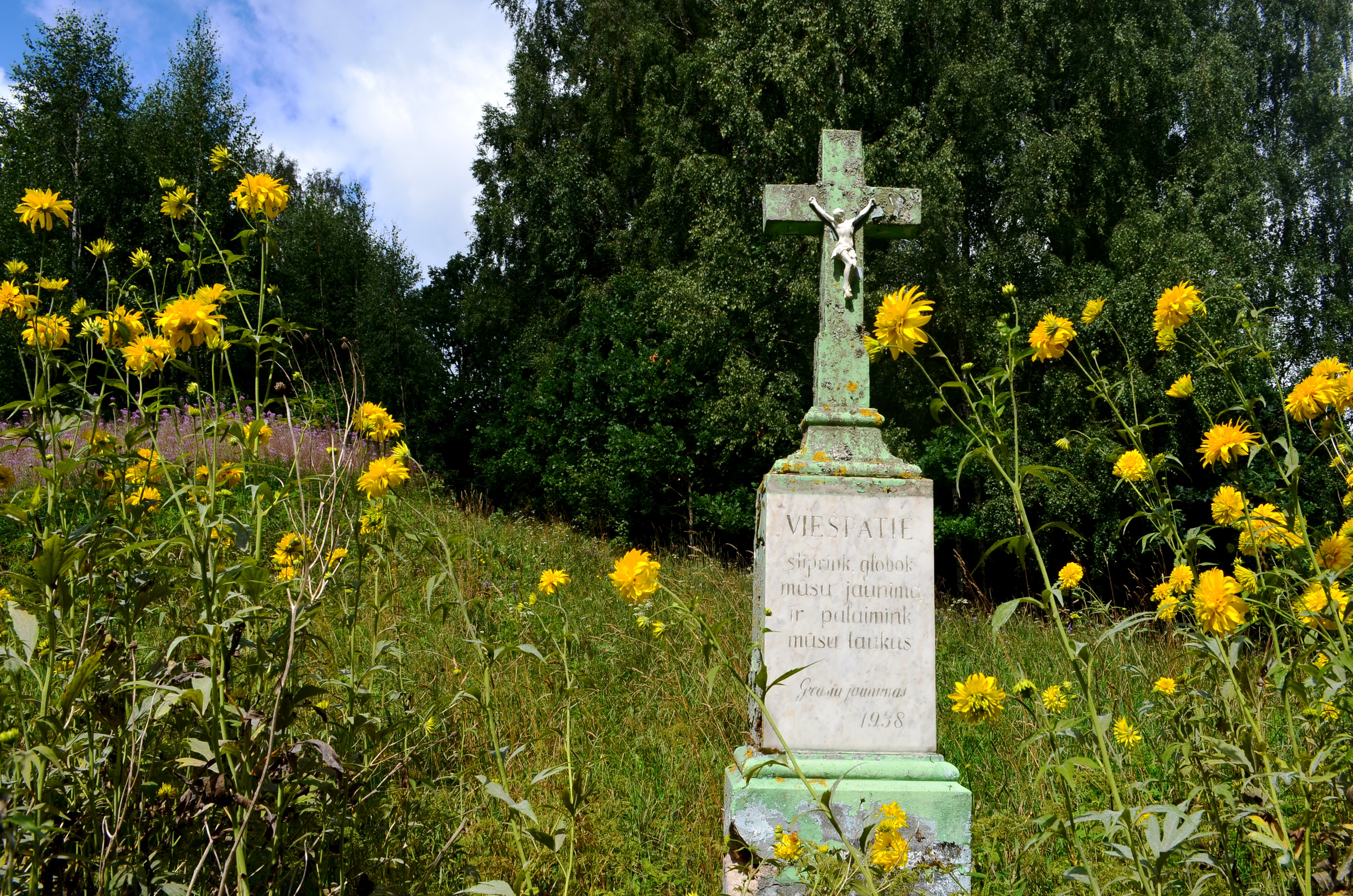 Kryžius, Grašių k., Utenos raj.